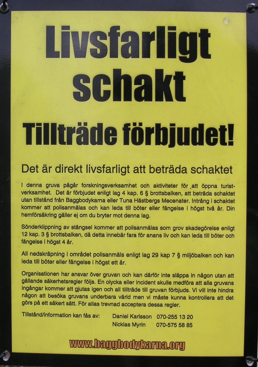 Tuna-Hästbergs gruva, varningsskylt